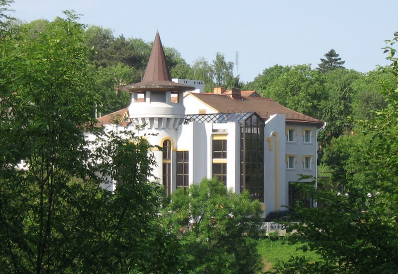 Дом творчества ученых.